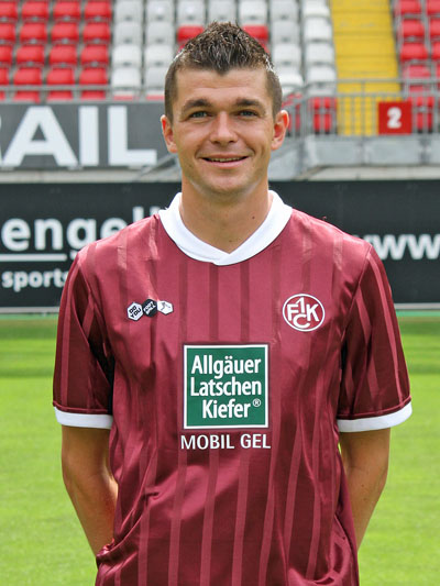 Jan Šimůnek, tschechischer Fußballspieler